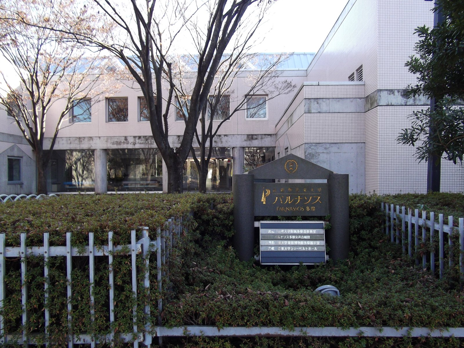 武蔵野音楽大学パルナソス多摩。東京都多摩市。